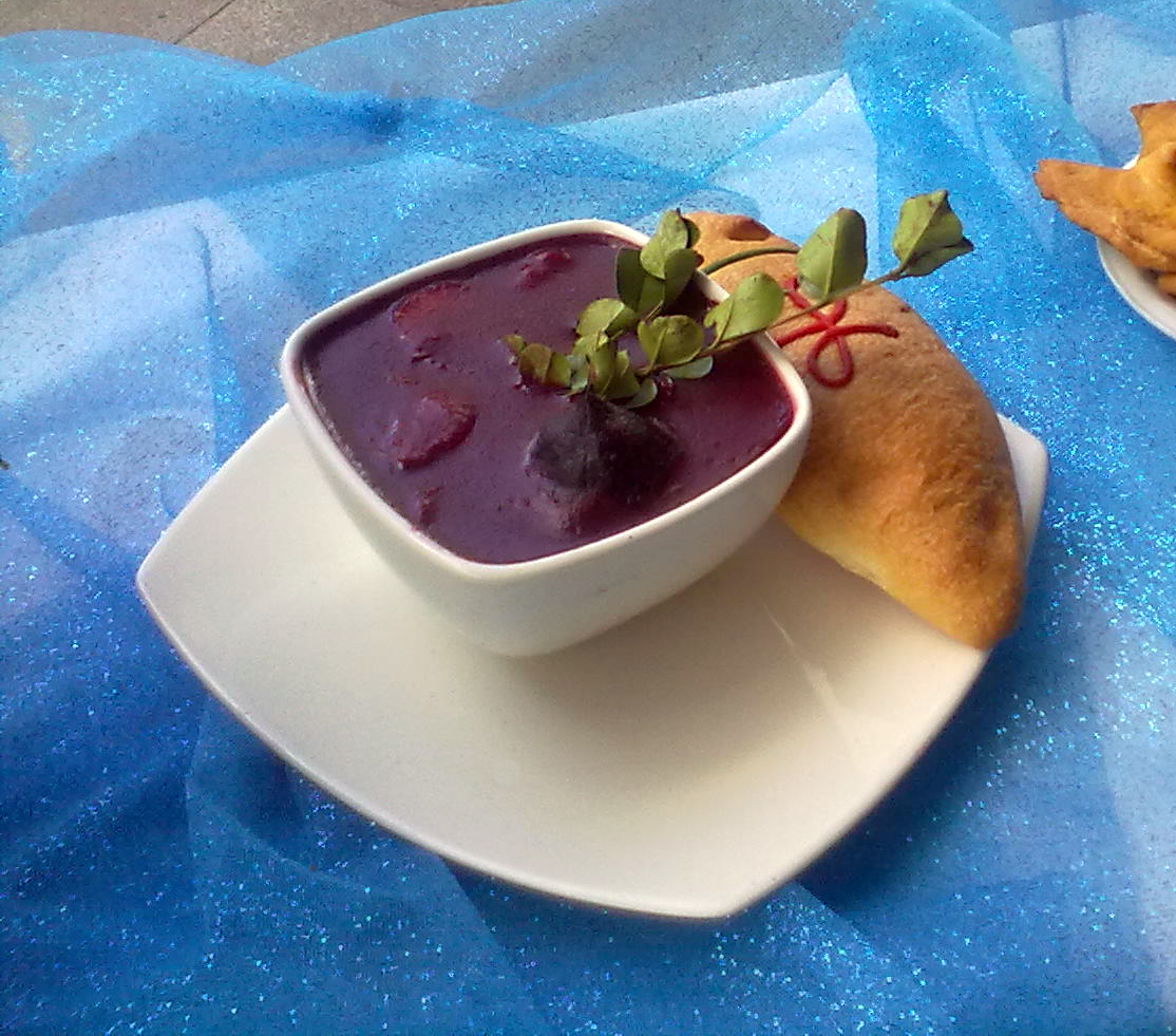 Colada morada y guagua de pan. La colada morada es una bebida típica de la época de Finados (2 de noviembre), en Ecuador, de ahí su color morado. Al parecer, su origen es una bebida incaica; los ingredientes de la colada son: hojas de naranja, hierbaluisa, cedrón, arrayán, ataco, panela, mora, frutilla, mortiño, clavo de olor, canela, pimienta dulce, ishpingo, harina negra de maiz y maicena.